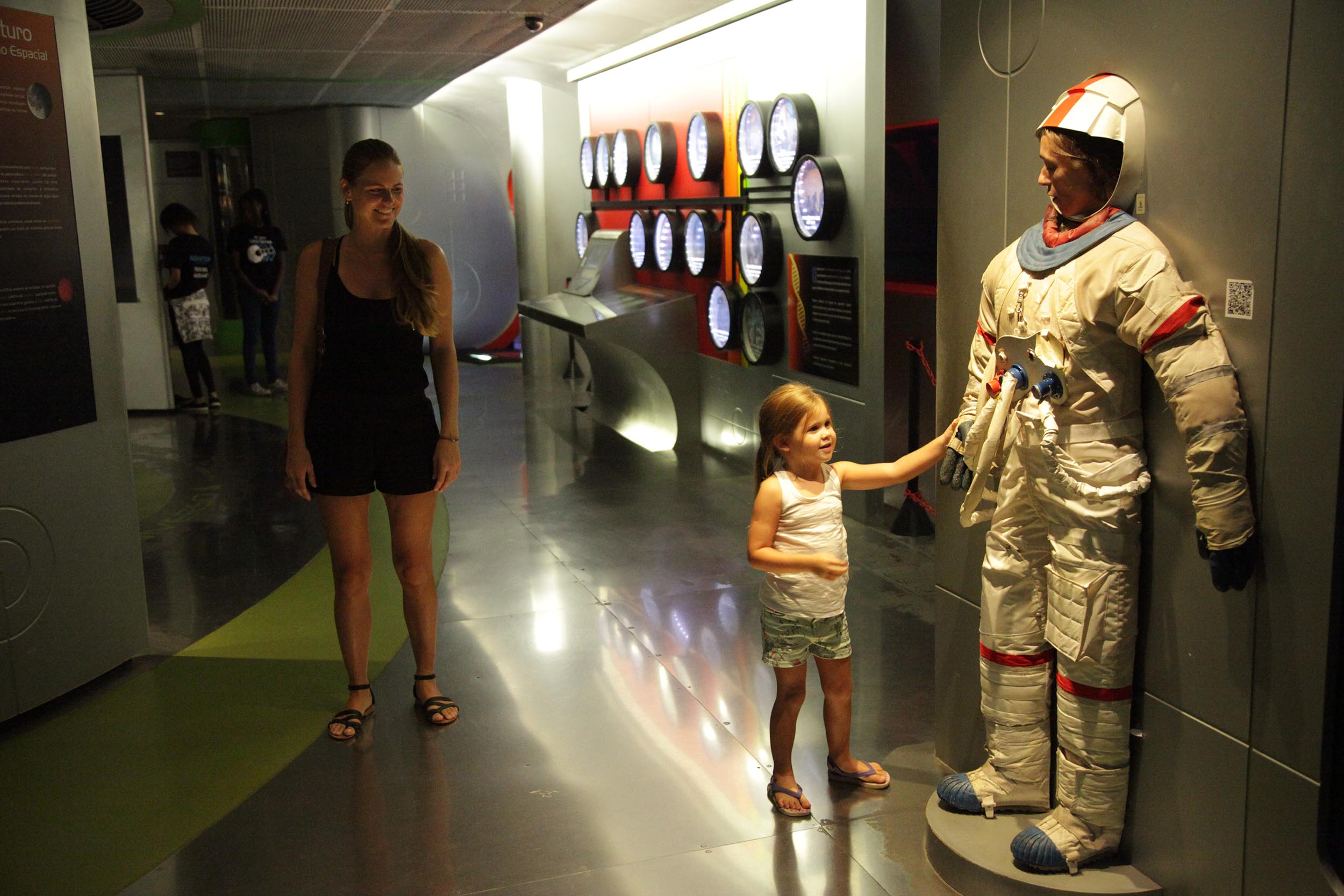 Museu do Universo, no Planetário da Gávea no Rio de Janeiro.